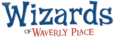 Logo de Los Hechiceros de Waverly Place'